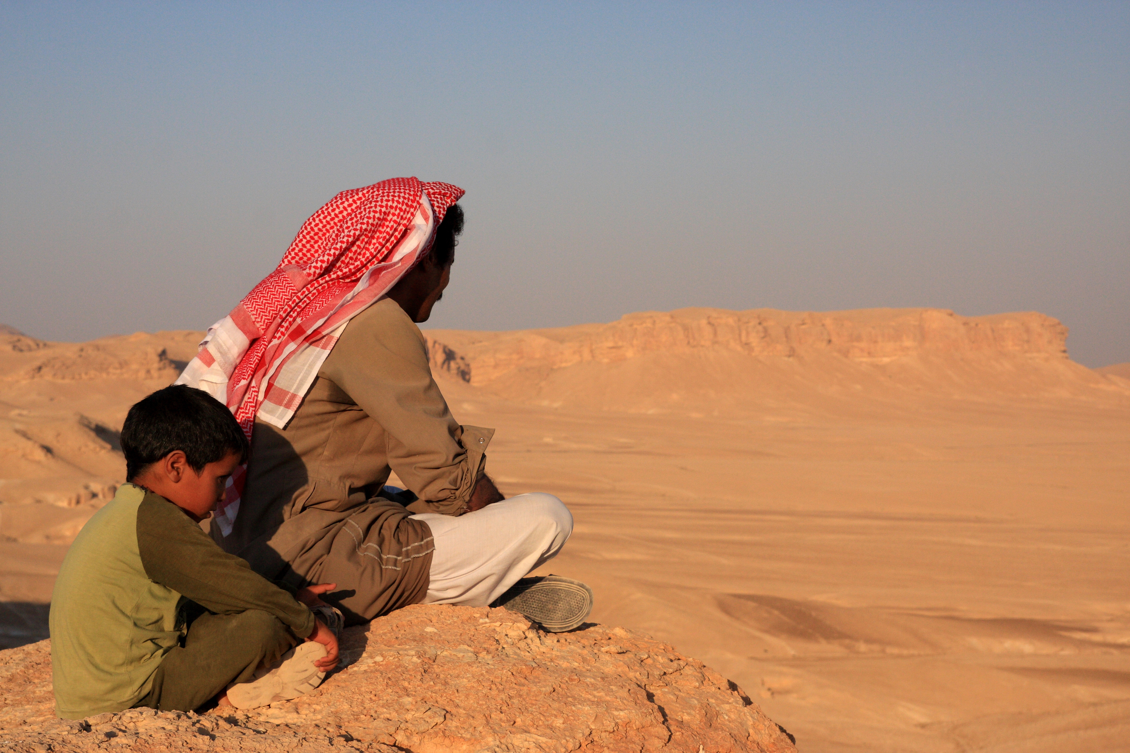 Bedouin, Syrian Desert